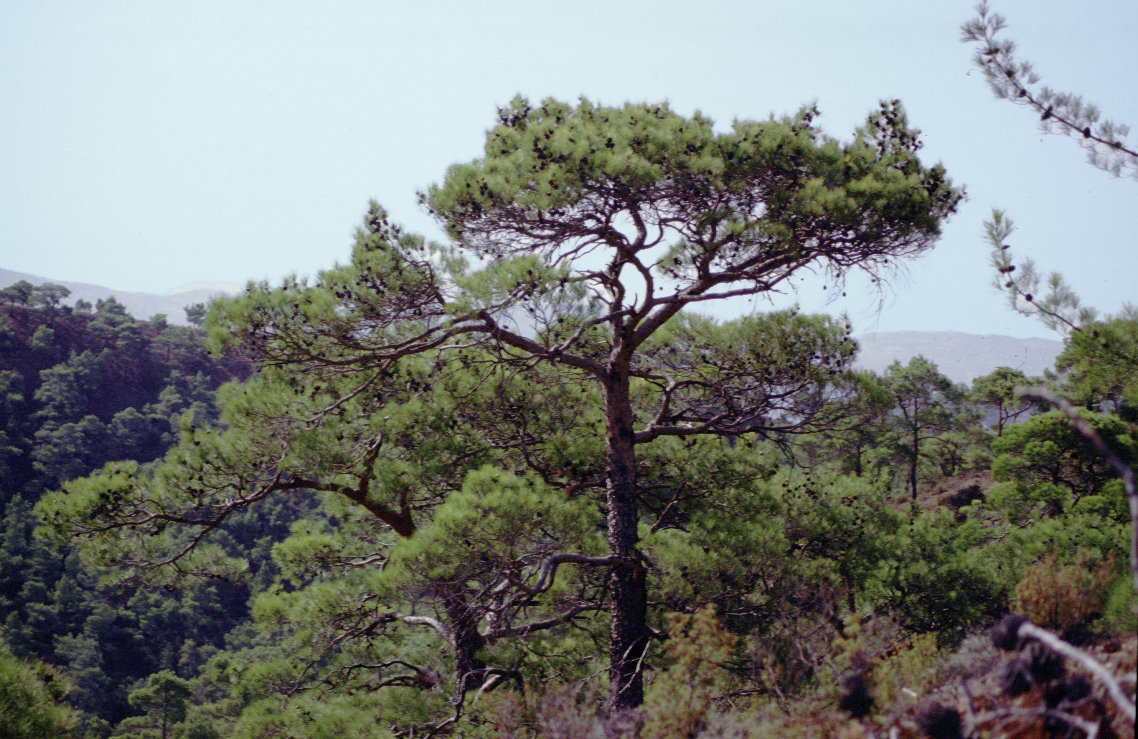 Kalabrische Kiefer Pinus brutia (Troodos, Zypern)